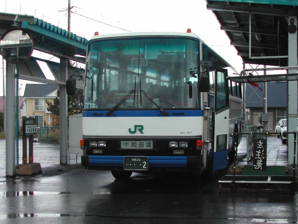 十和田東線 十和田南駅前にて撮影